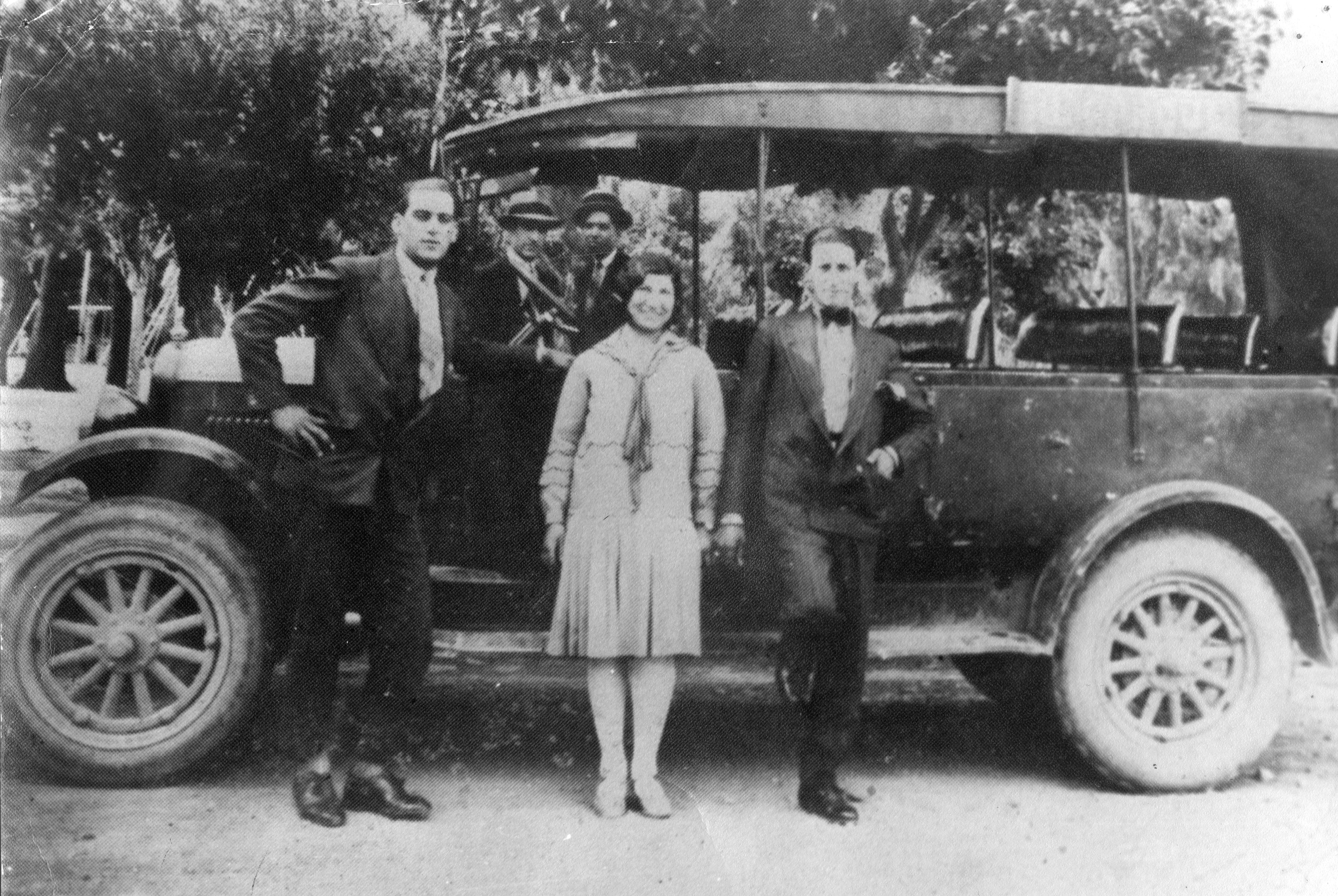 Ford T modelo 1924 adquirido por la compañía de ómnibus Gonzalez para cubrir el recorrido entre Bahía Blanca y Gral. Daniel Cerri